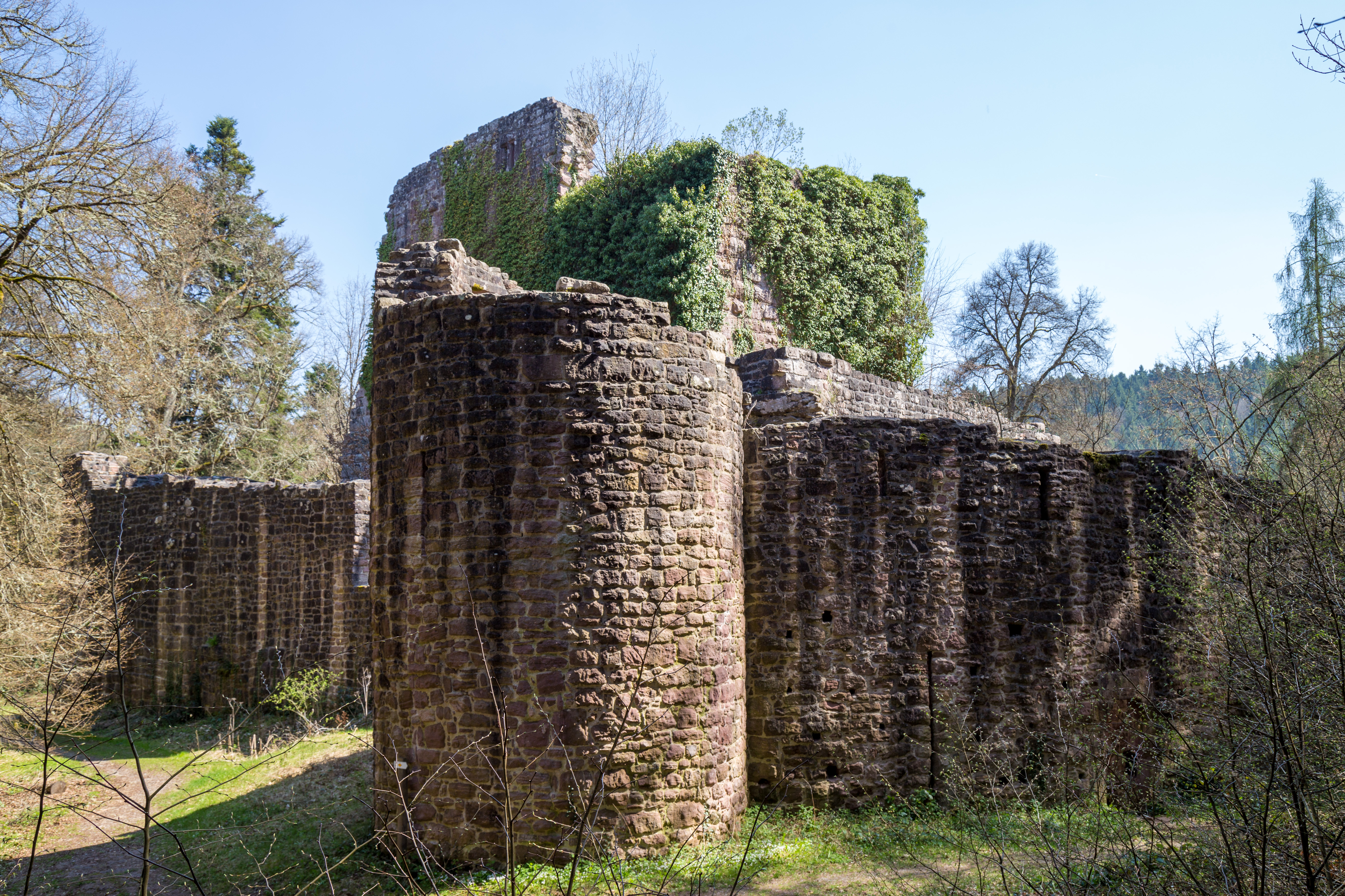 Burgruine Waldeck bei Calw im Schwarzwald